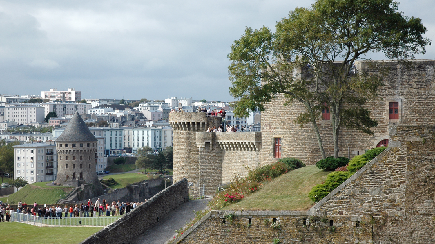 Le donjon du château de Brest, en arrière plan la tour Tanguy à Recouvrance - Format 16/9 - journée du patrimoine.